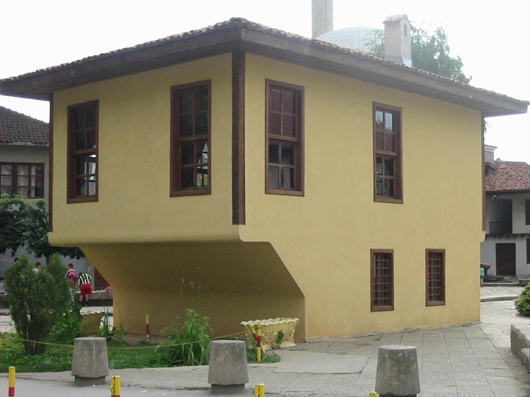 Ura e vjetër e gurit në Prizren